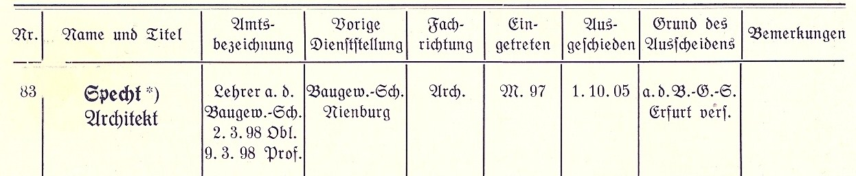 Eintrag für Bruno Specht, Architekt (1856-??)